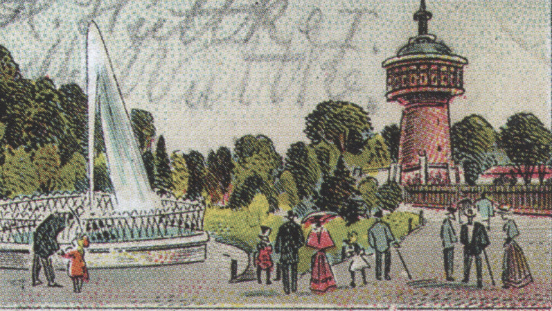 Gaststätte Turmpark in Salbke um 1904, Festsaal